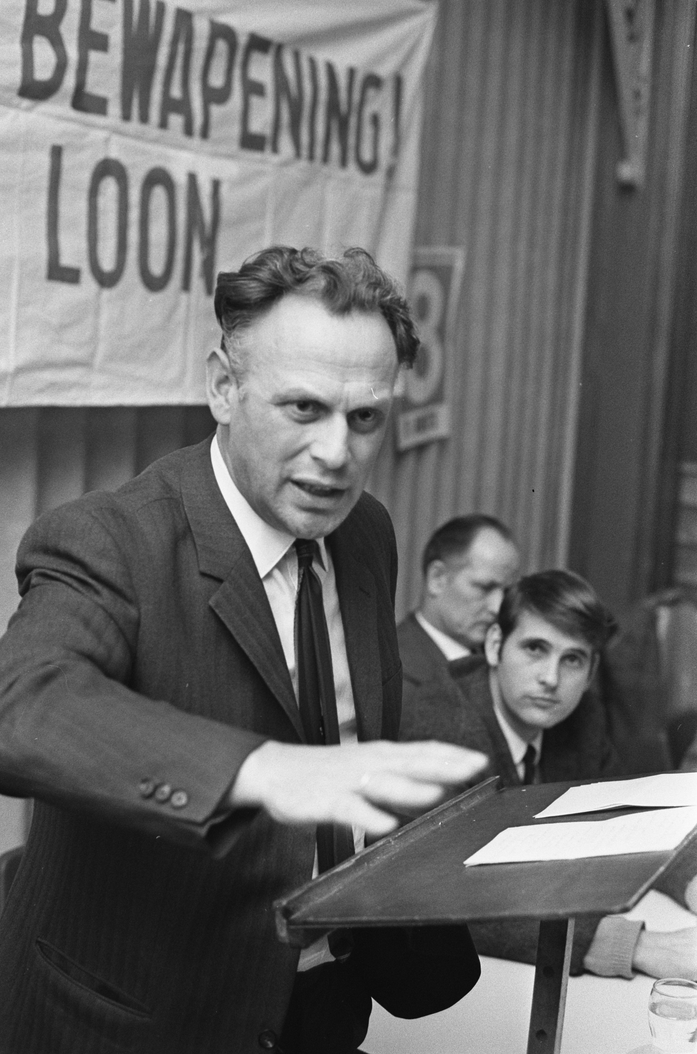 Collectie / Archief : Fotocollectie Anefo Reportage / Serie : [ onbekend ] Beschrijving : CPN-vergadering in Purmerend; Tweede Kamerlid Henk Hoekstra aan het woord Datum : 6 maart 1970 Locatie : Noord-Holland, Purmerend Trefwoorden : parlementariërs, politiek, vergaderingen Persoonsnaam : Hoekstra, H.J. Instellingsnaam : Elsevier Fotograaf : Verhoeff, Bert / Anefo Auteursrechthebbende : Nationaal Archief Materiaalsoort : Negatief (zwart/wit) Nummer archiefinventaris : bekijk toegang 2.24.01.05 Bestanddeelnummer : 923-3228